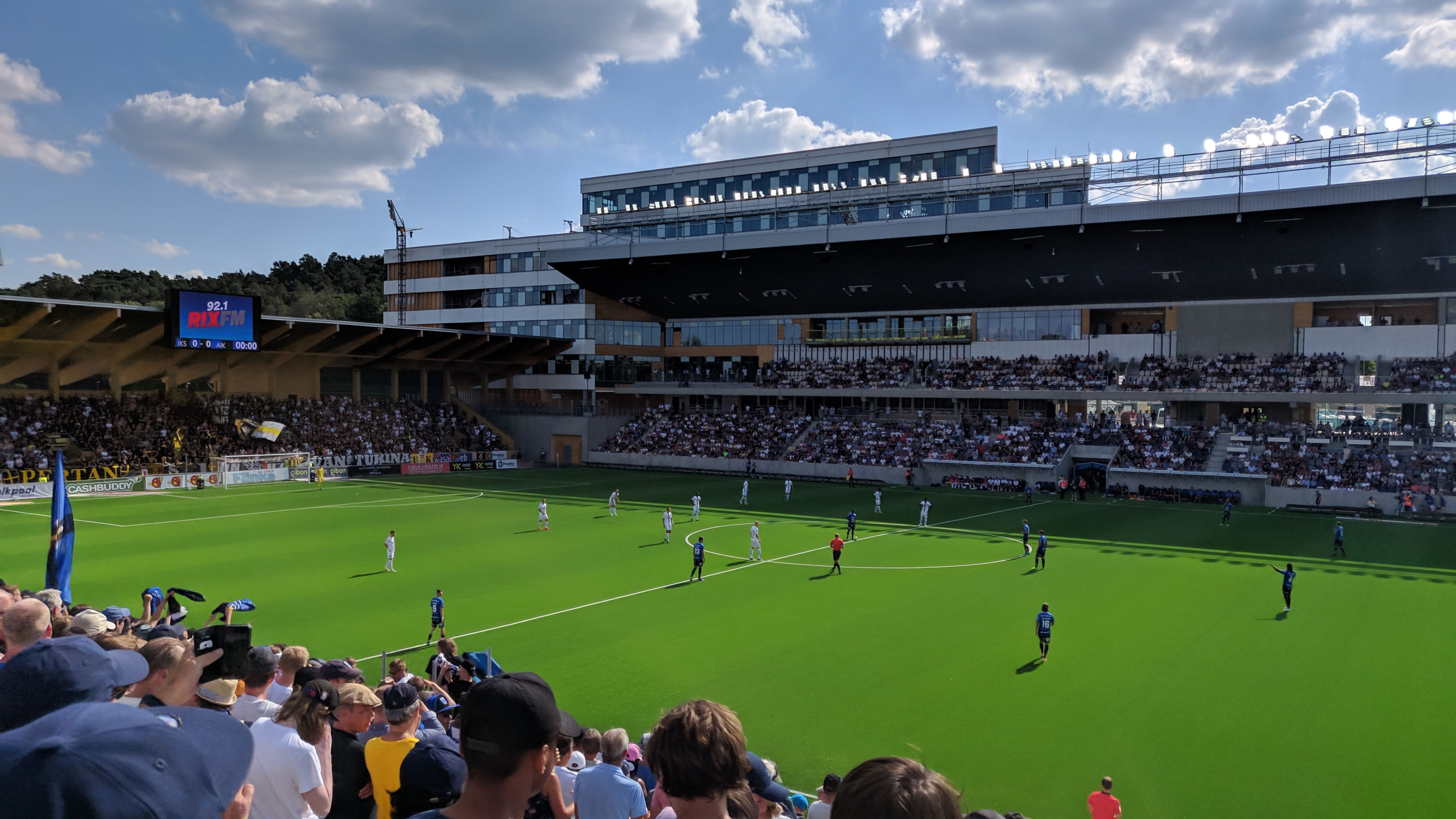 Bild över Studenternas IP i Uppsala (tagen den 27 juli 2019).